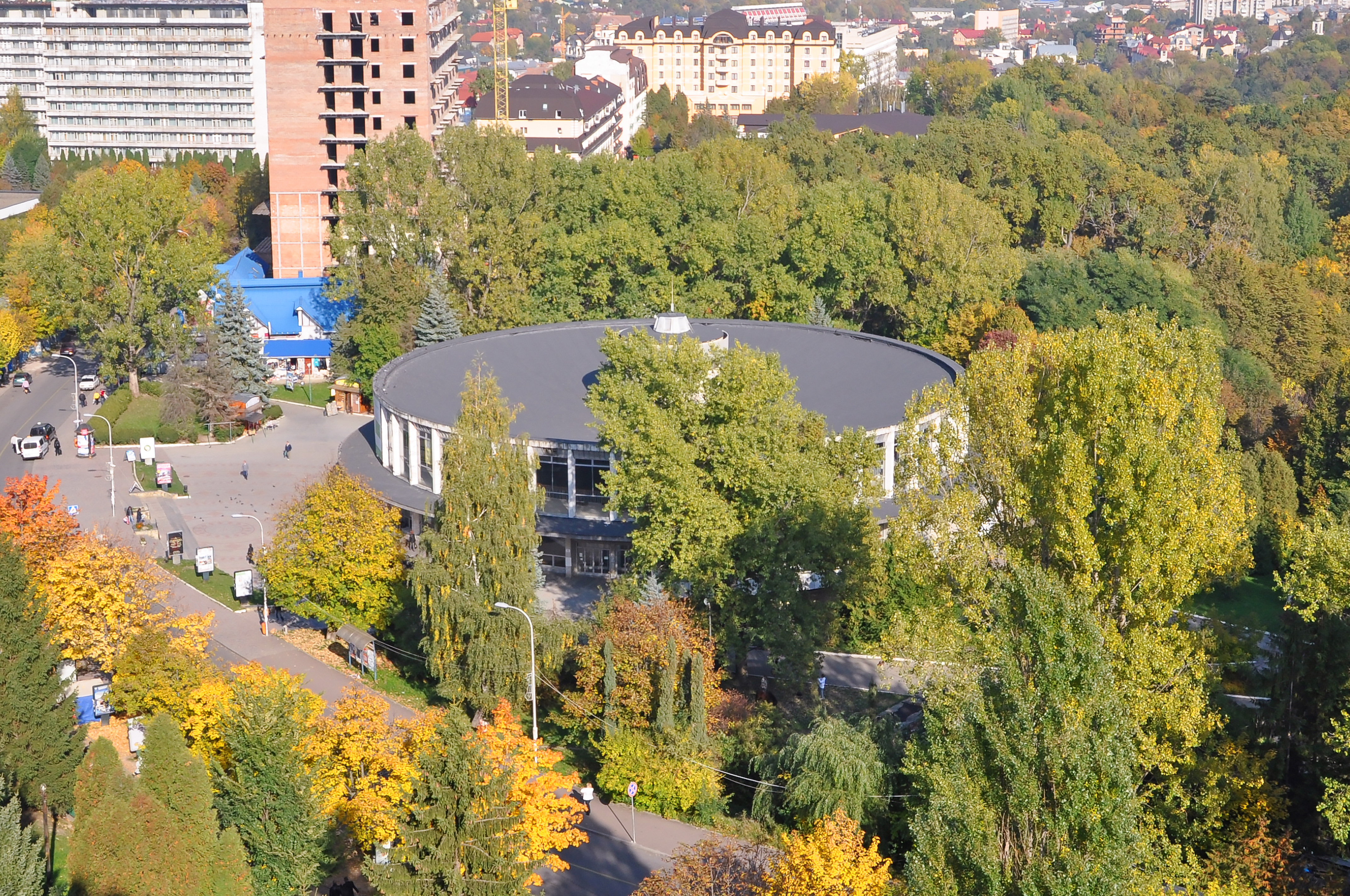 Курортный Бювет 2 или "верхний" источник с водами в Трускавце. Возле санаториев Кристалл, Алмаз, Шале Грааль, Женева.